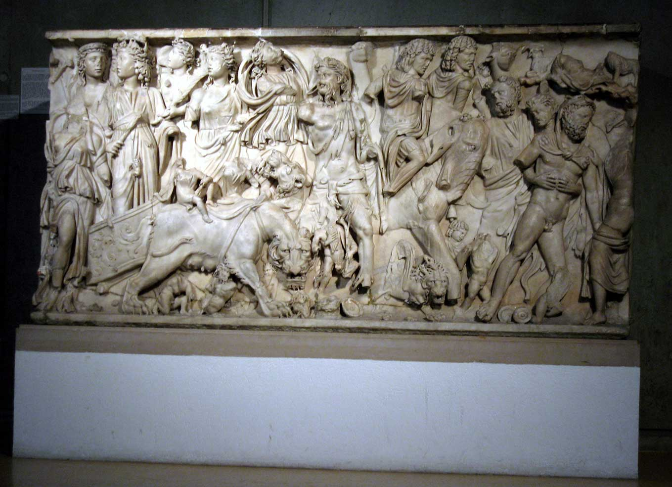 Description : Sarcophage romain triomphe de Bacchus - Musée gallo-romain de Lyon Lieu : Lyon, France Date : 2006